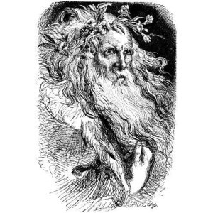 Regele Lear, de Sir John Gilbert.